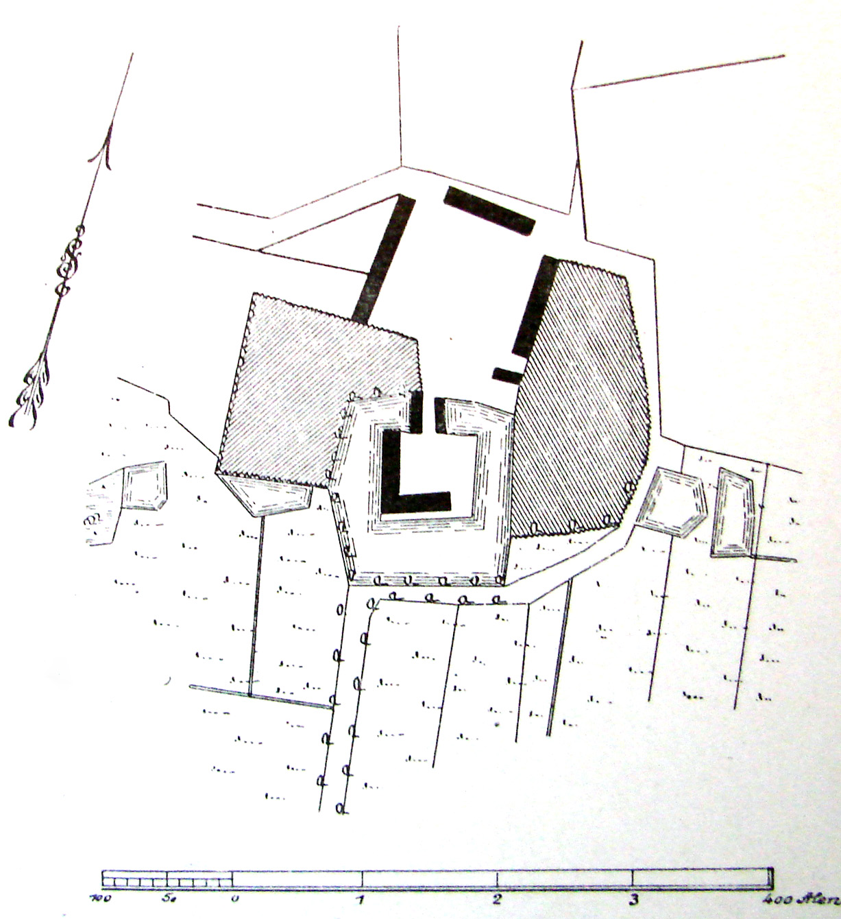 Kongstedlund grundplan omkring 1800 . Kongstedlund ligger i Sønder Kongerslev Sogn, Hellum Herred, Ålborg Amt, Sejlflod Kommune. Hovedbygningen er opført i 1592 og ombygget i 1640